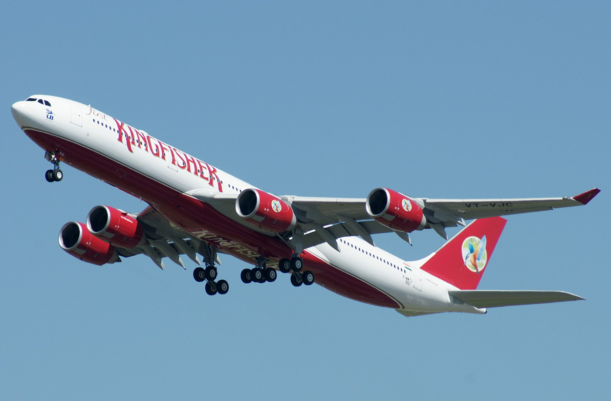 Photo prise à l'aéroport de Toulouse-Blagnac (LFBO) en France. Picture take at Toulouse-Blagnac Airport (LFBO) in France.